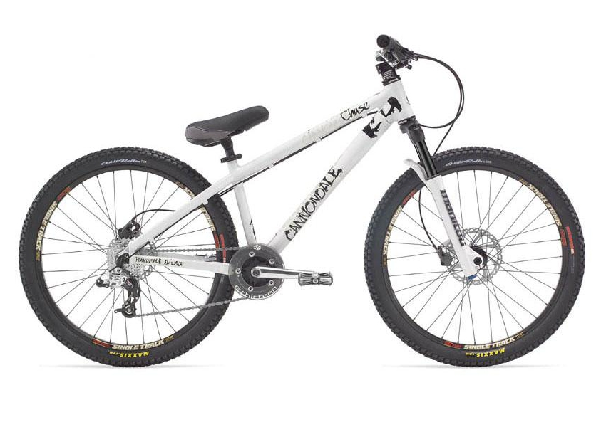 Cannondale Chase